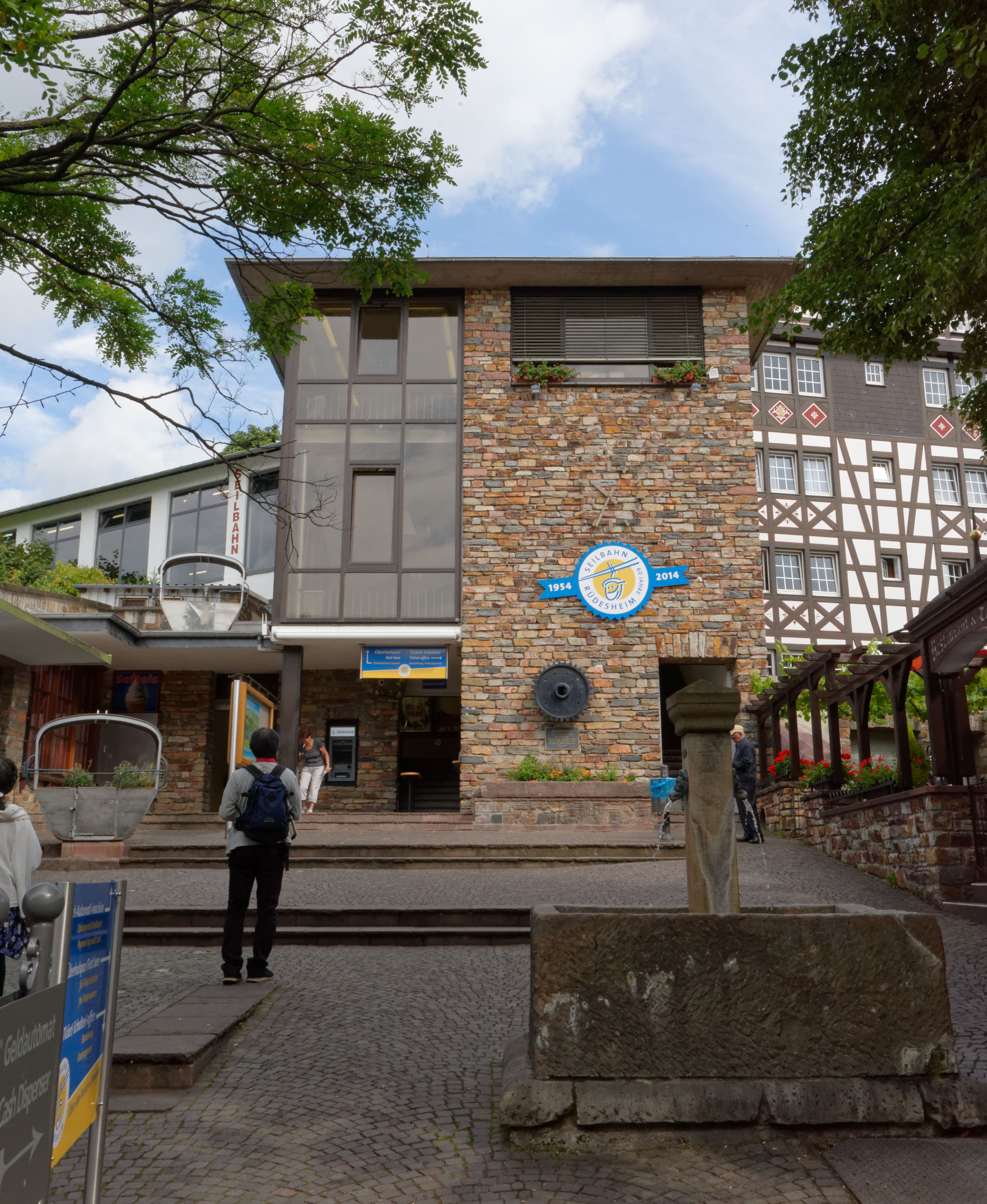 Rüdesheim Seilbahn zum Niederrheindenkmal Eingang der Station in Rüdesheim